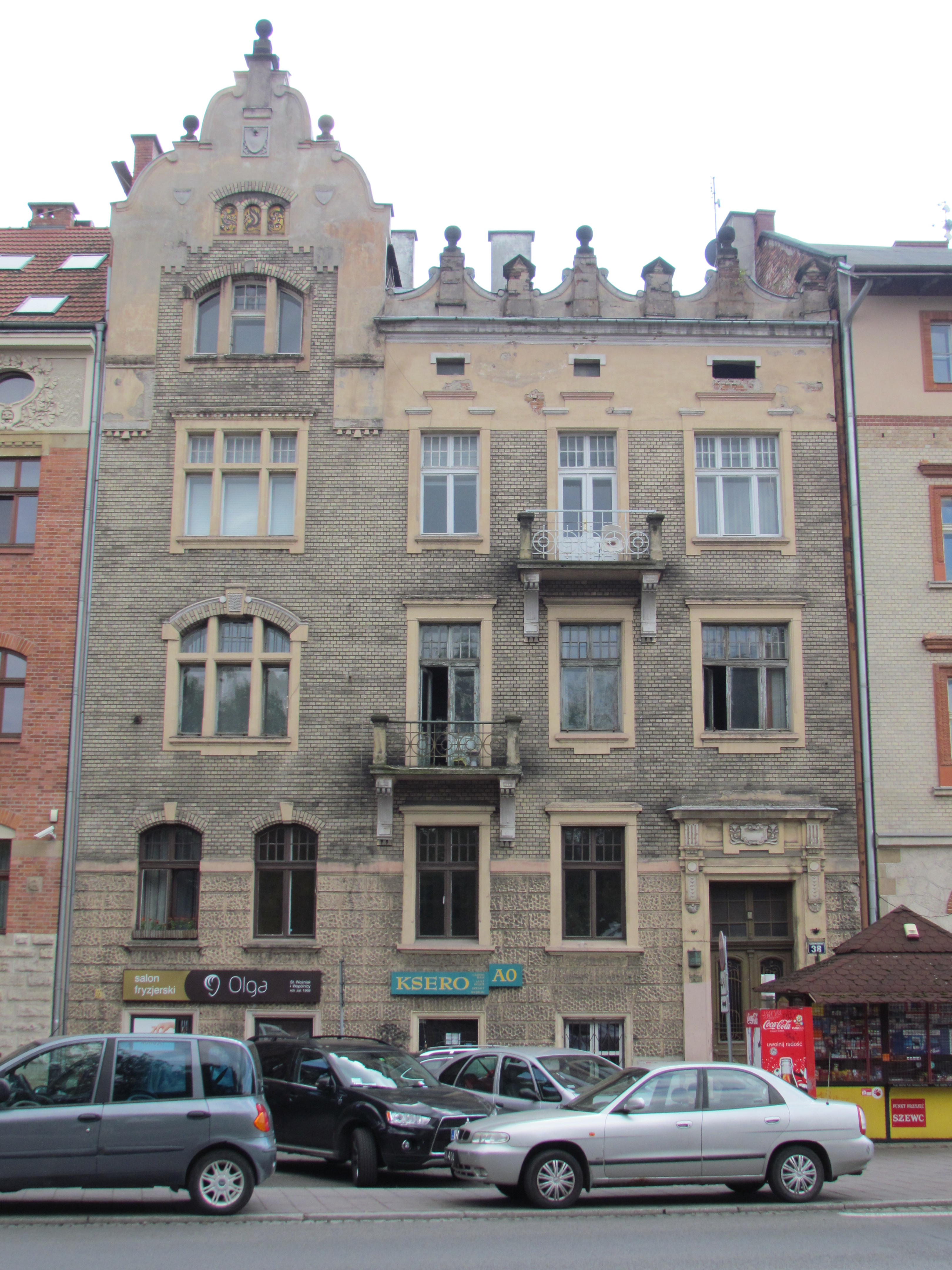 kamienica, Kraków, ul. Piłsudskiego 38